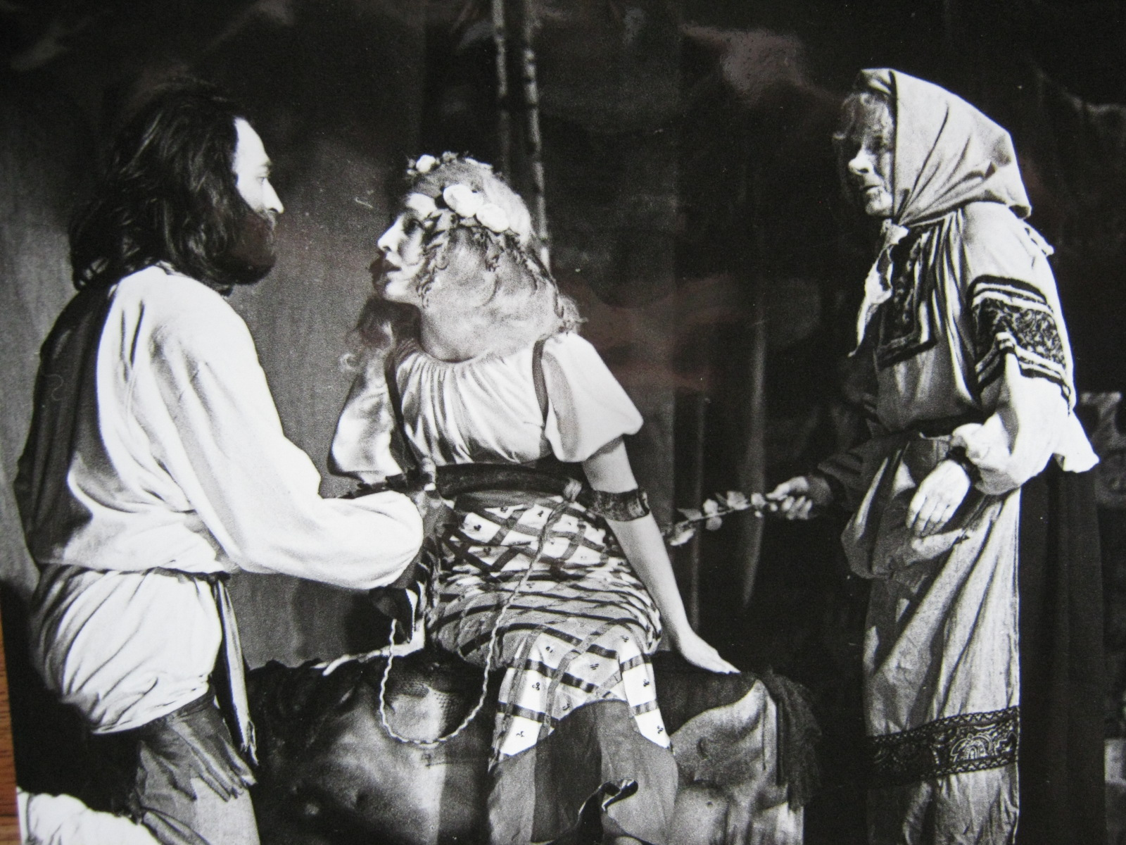 Спектакль Санкт-Петербургского драматического театра «Патриот» РОСТО «Сказ о солда́те и Бессме́ртном Коще́е» Б.Маслов в роли Лешего, М.Петрова в роли Русалки, В.Балабина в роли Бабы Яги, режиссёр-постановщик Егоров Г.С.